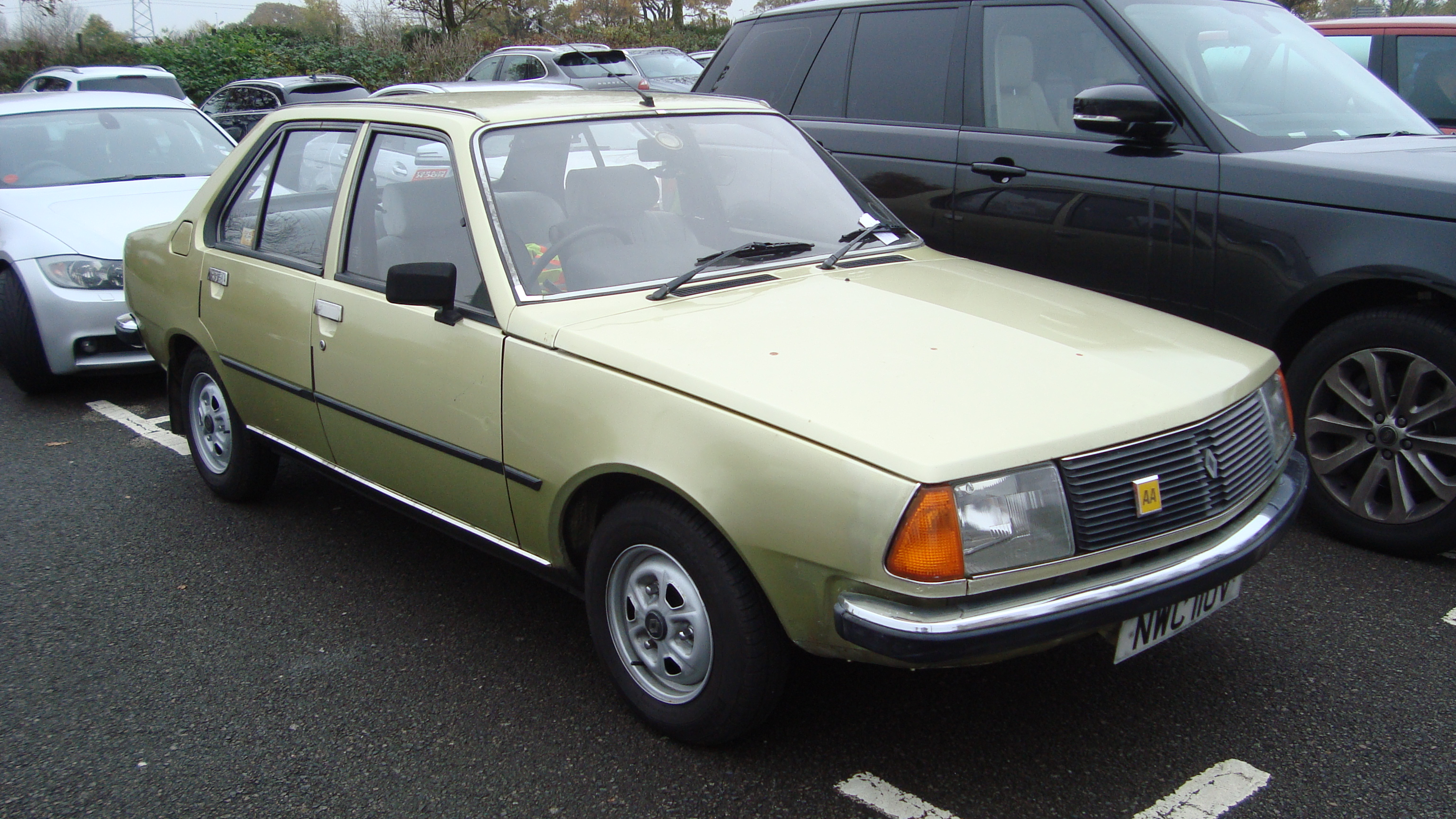 1980 Renault 18 1.6 TS